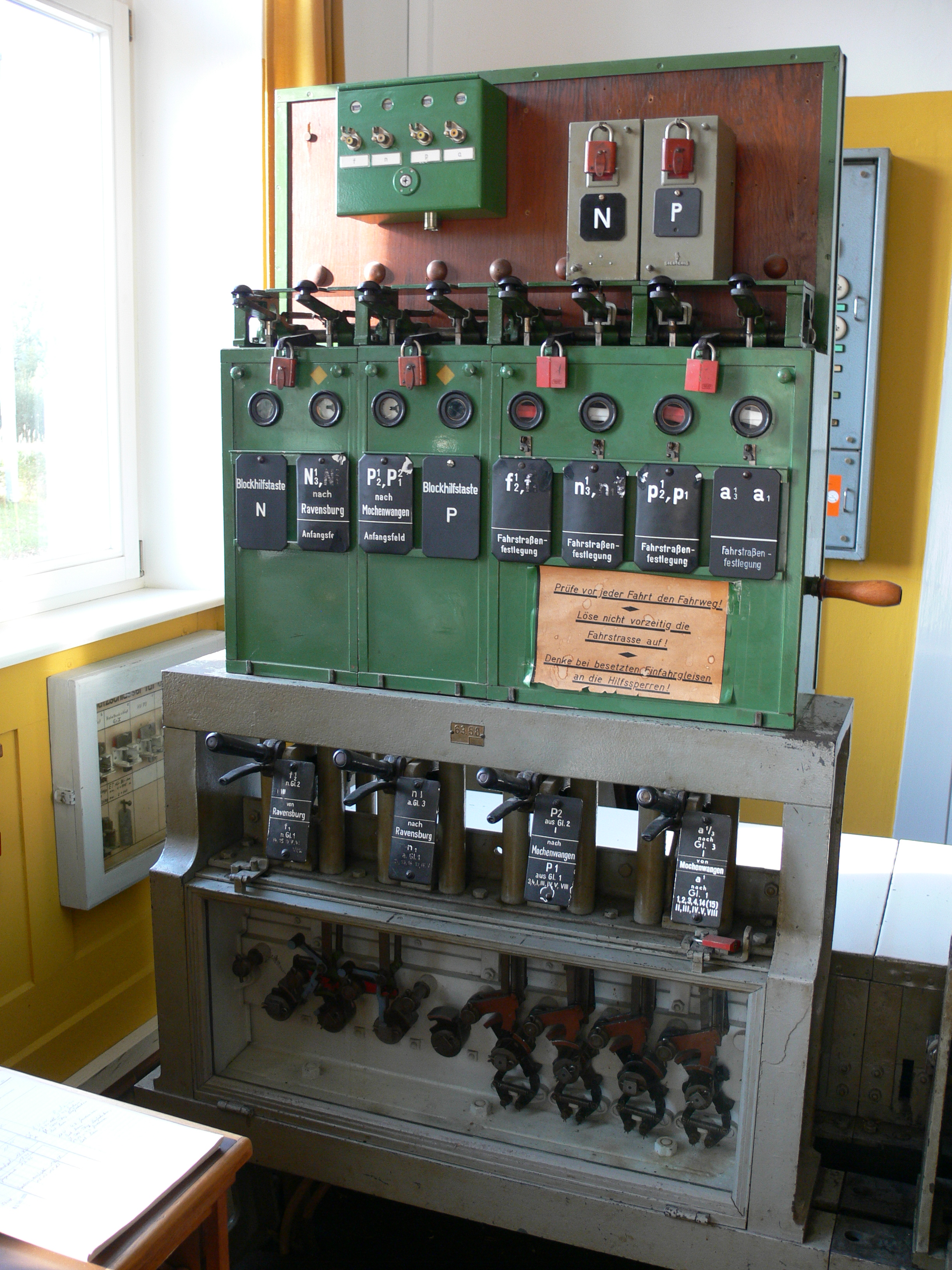 Bahnhof Niederbiegen, Blockauf- und -untersatz des Stellwerkes 2, Bauform Einheit. Die Fahrstraßen a/3 und n3 sind eingestellt und festgelegt, die zugehörigen Hauptsignale A und N3 stehen auf Fahrt.